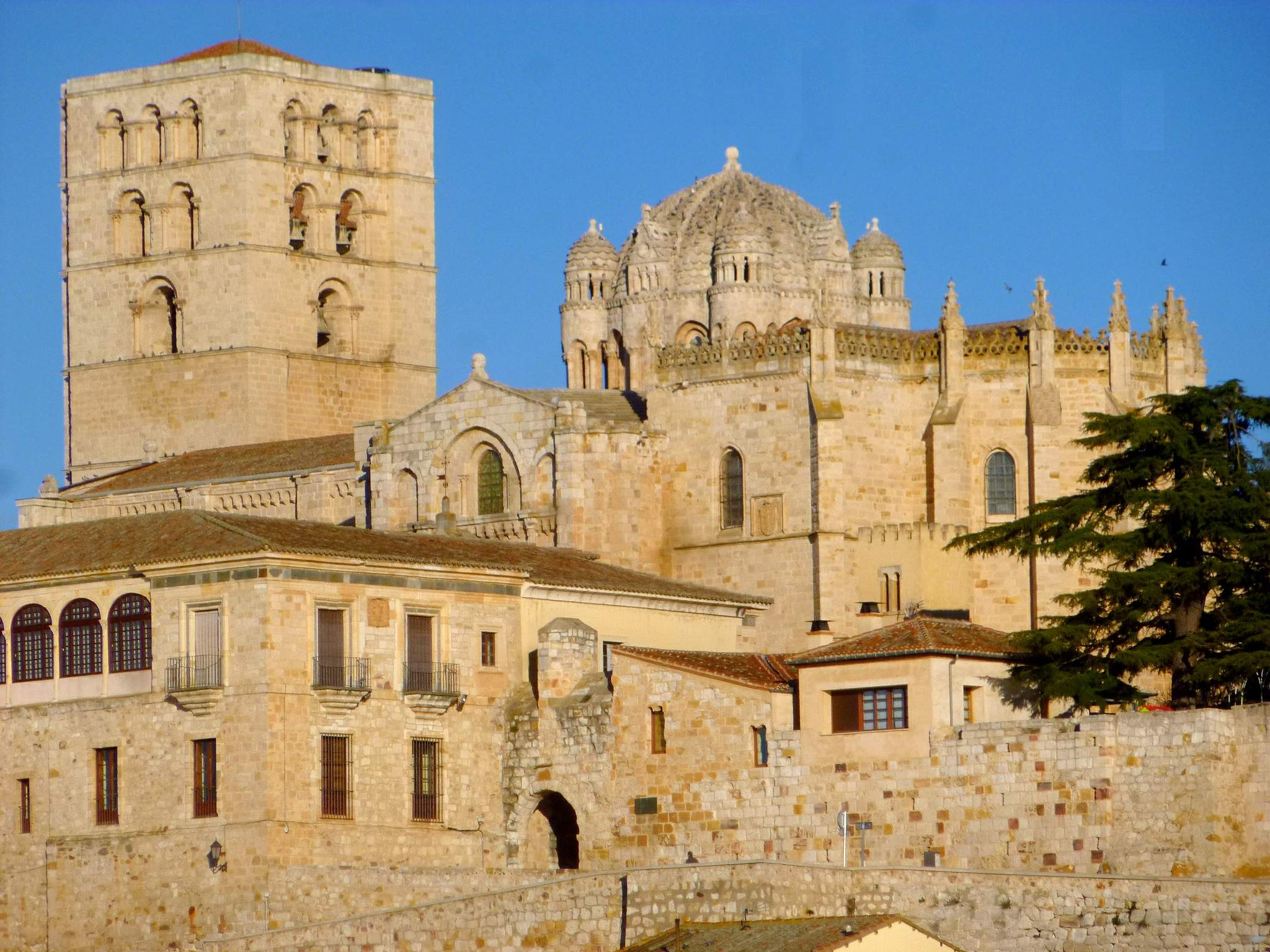 Catedral de Zamora